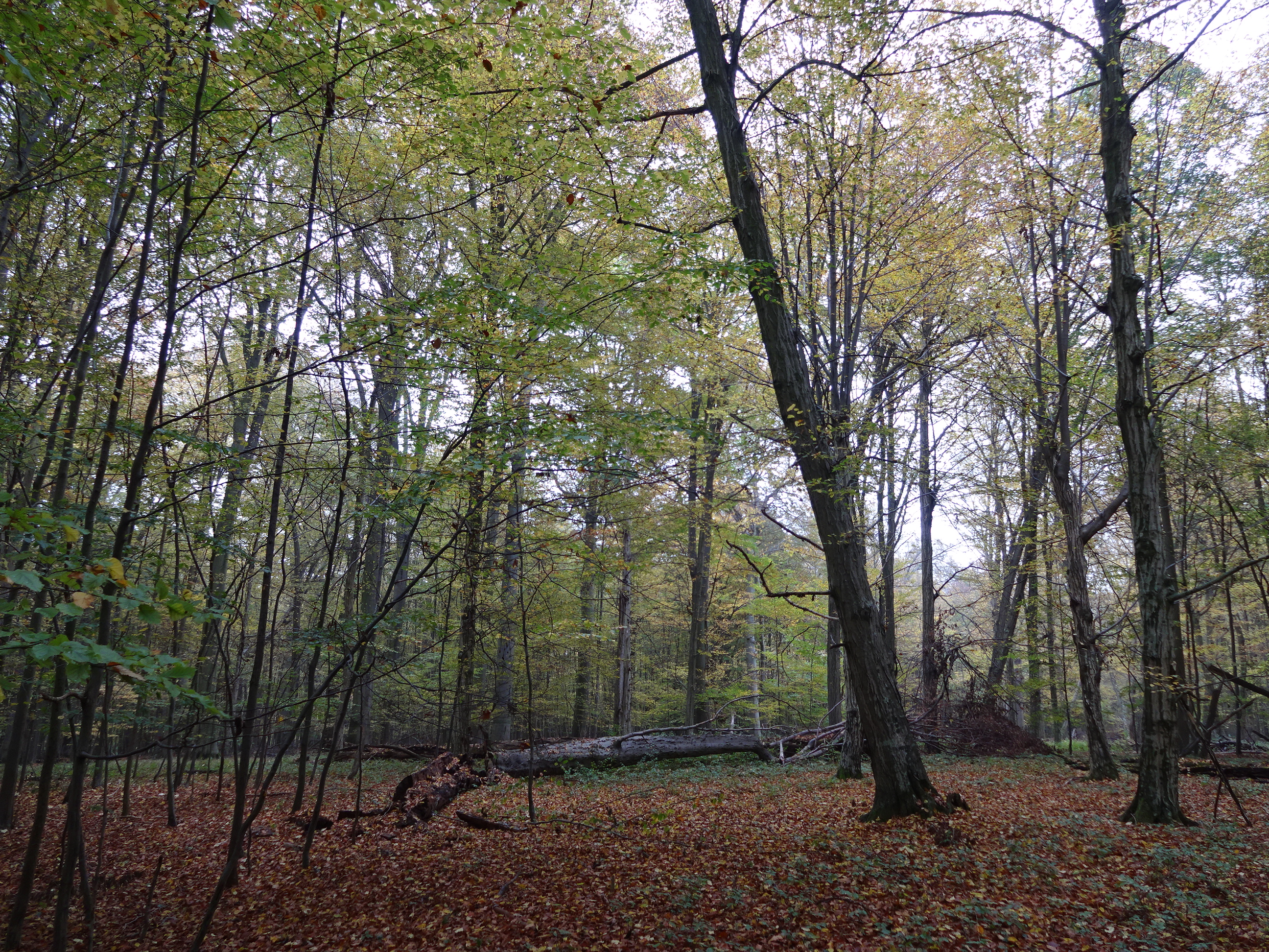 Přírodní rezervace ponechaná na pospas přirozenému vývoji.